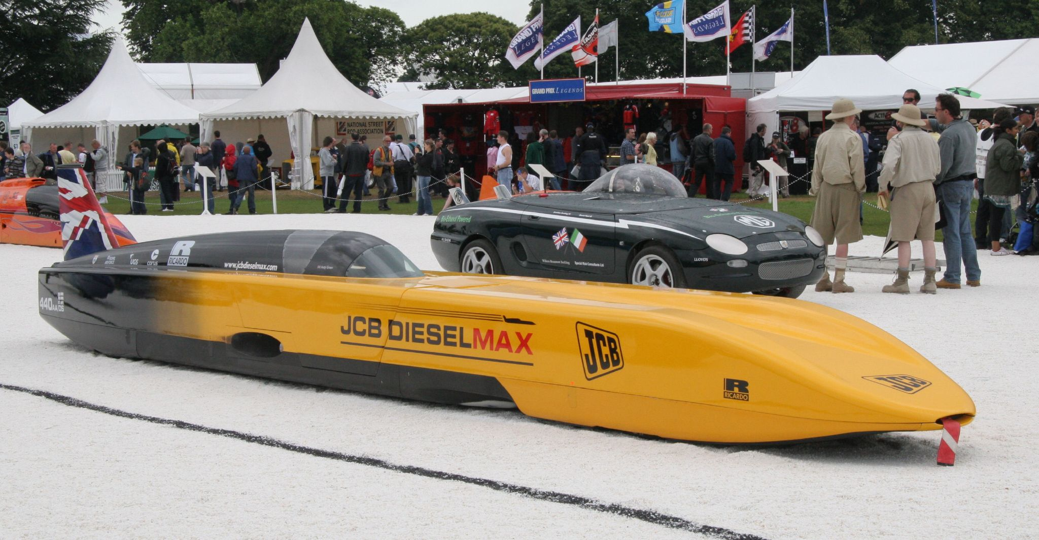 JCB Diesel Max and MG TF